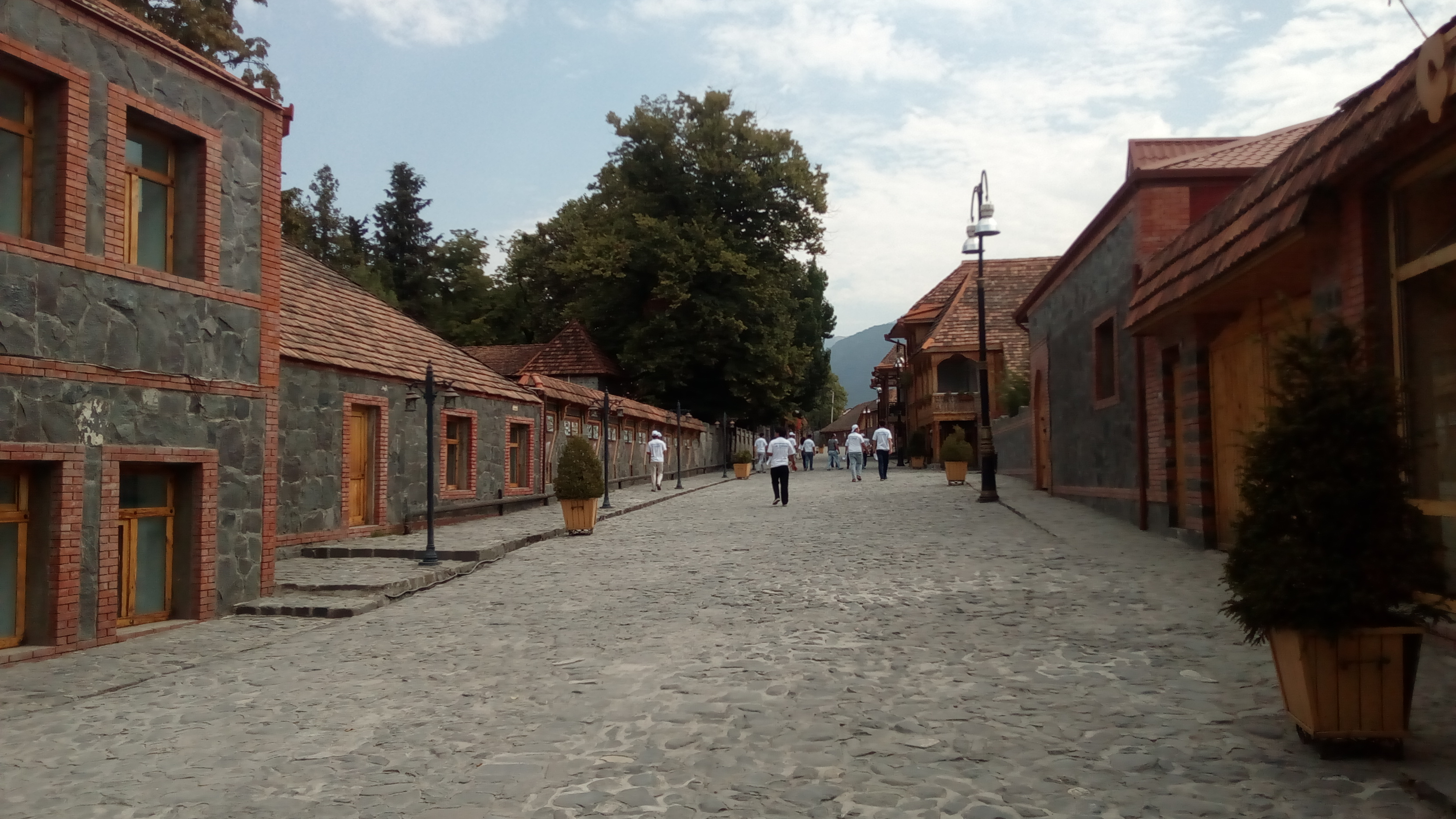 2017 Yay Vikidüşərgəsində Cekli829 tərəfindən çəkilmiş şəkil